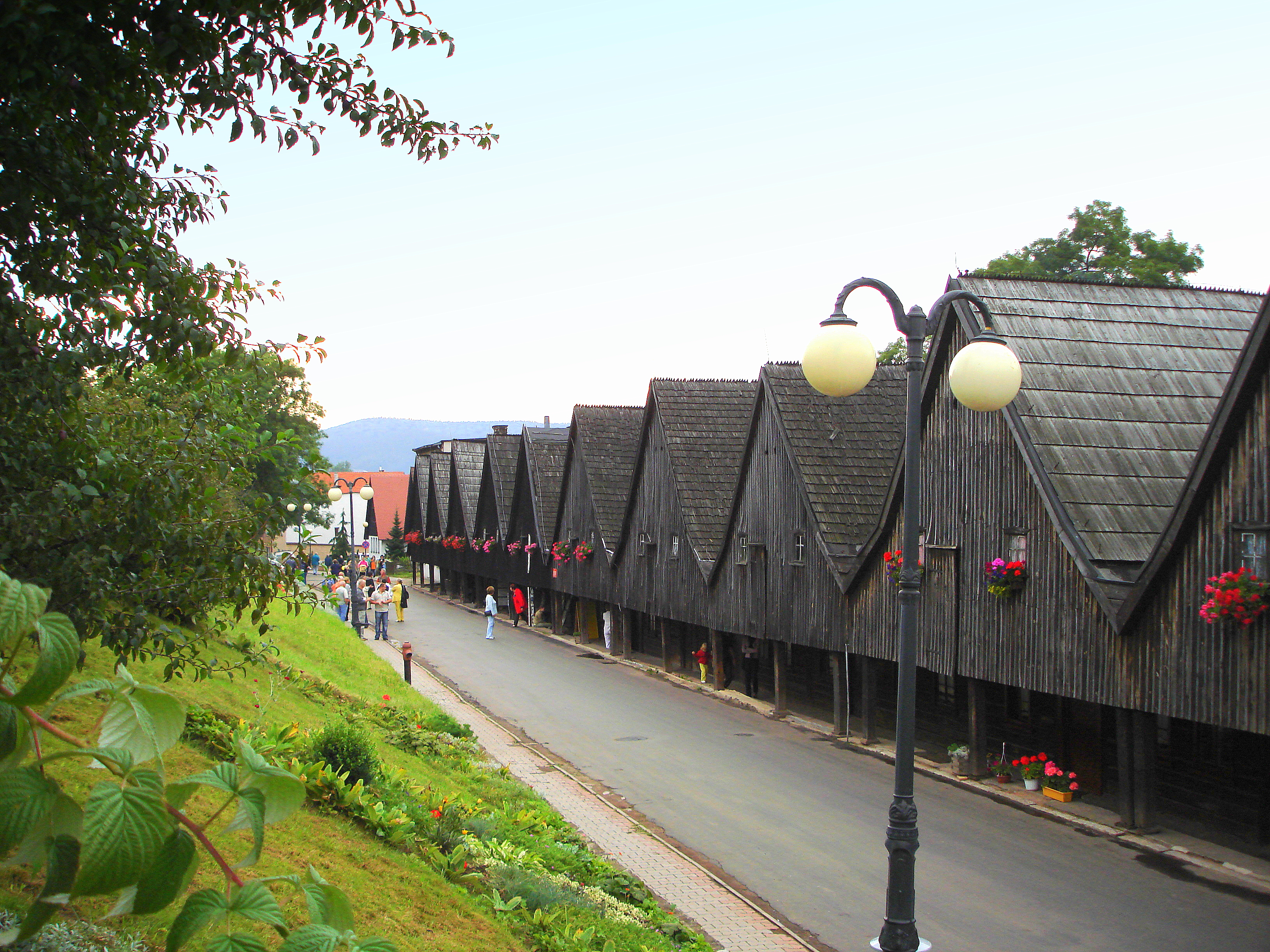 Chełmsko Śląskie, Dwunastu Apostołów